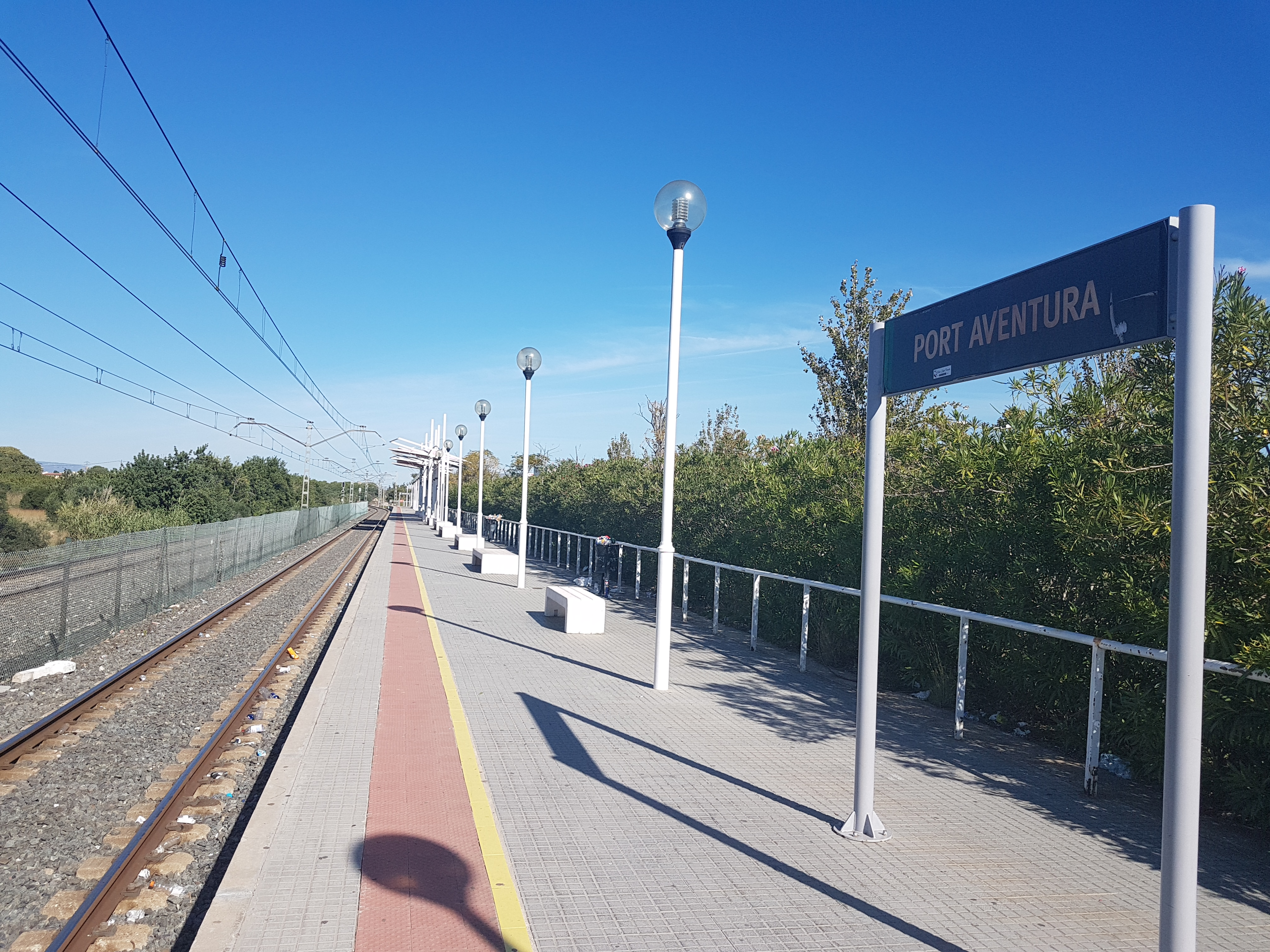 Estació de tren de Port Aventura de la línia Tarragona-Tortosa